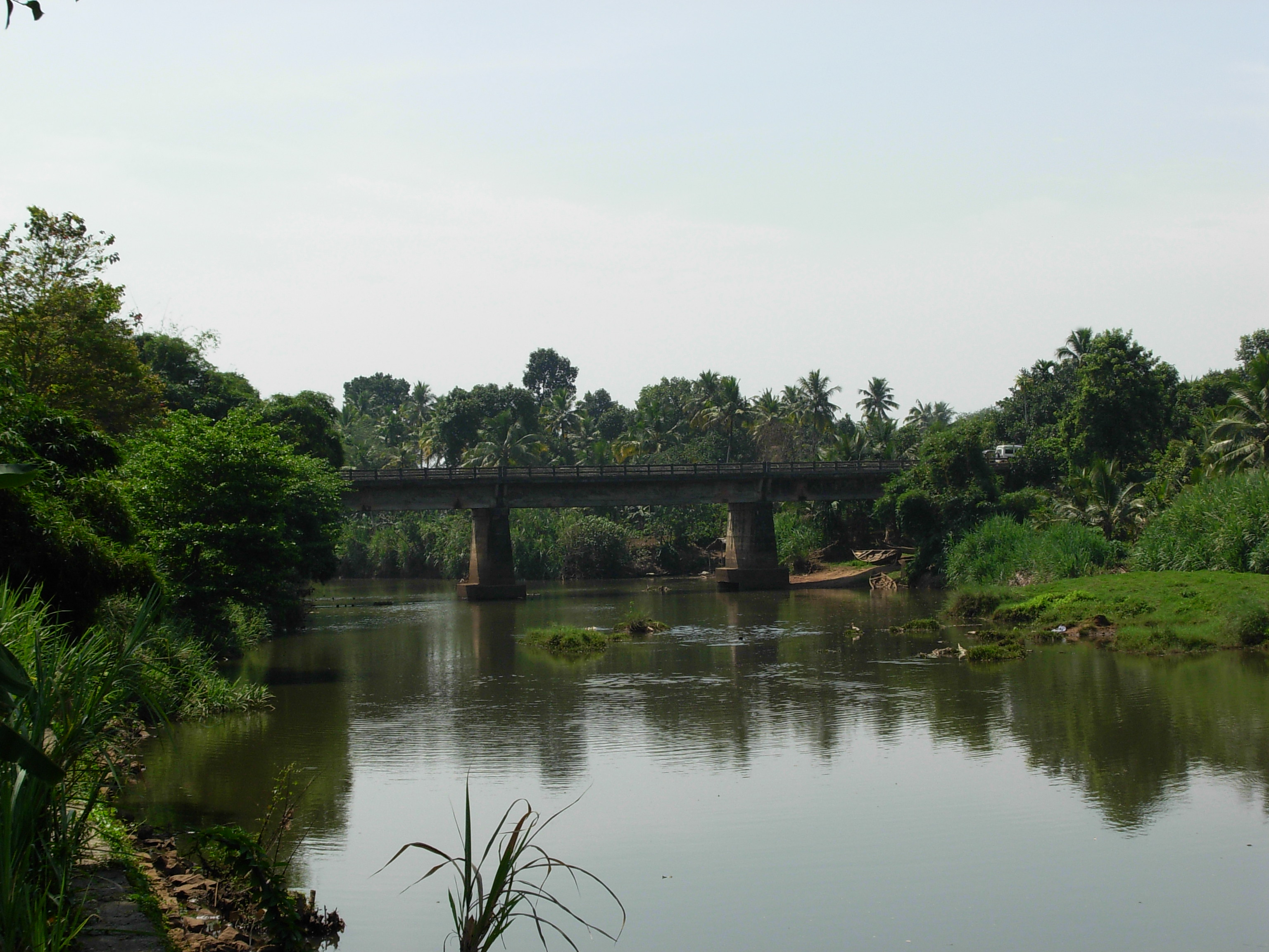 വെണ്മണി പുലക്കടവ് പാലം. അച്ചങ്കോവിലാറിനു കുറുകെയുള്ള ഈ പാലം 2000 - 2003 ൽ പണികഴിപ്പിച്ചു. പന്തളം മാവേലിക്കര റൂട്ടിലുള്ള വെട്ടിയാറിനെയും ചെങ്ങന്നൂർ താലൂക്കിലെ വെണ്മണിയേയും ബന്ധിപ്പിക്കുന്നു.